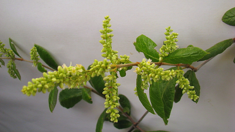 Trigonia nivea Cambess. var. pubescens (Cambess.) Lleras